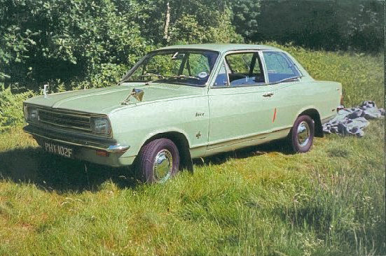 1966-1970 Vauxhall Viva (HB)